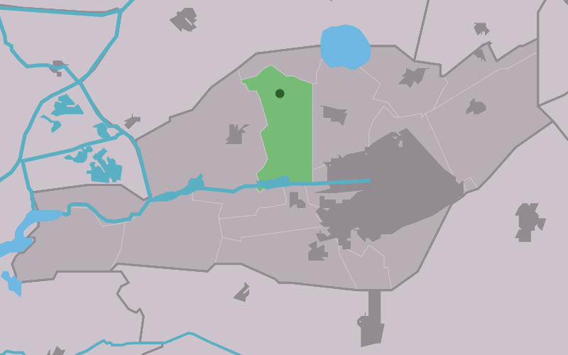 Kaartsje fan himrik fan Nyegea